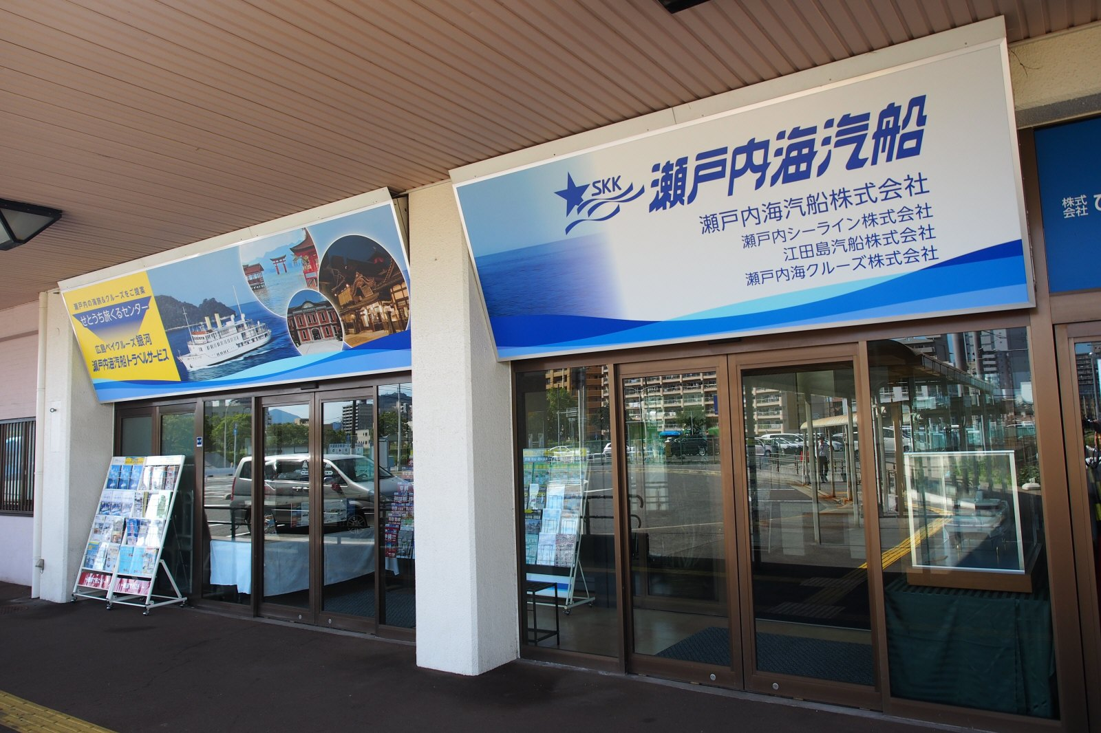 瀬戸内海汽船株式会社 本社事務所